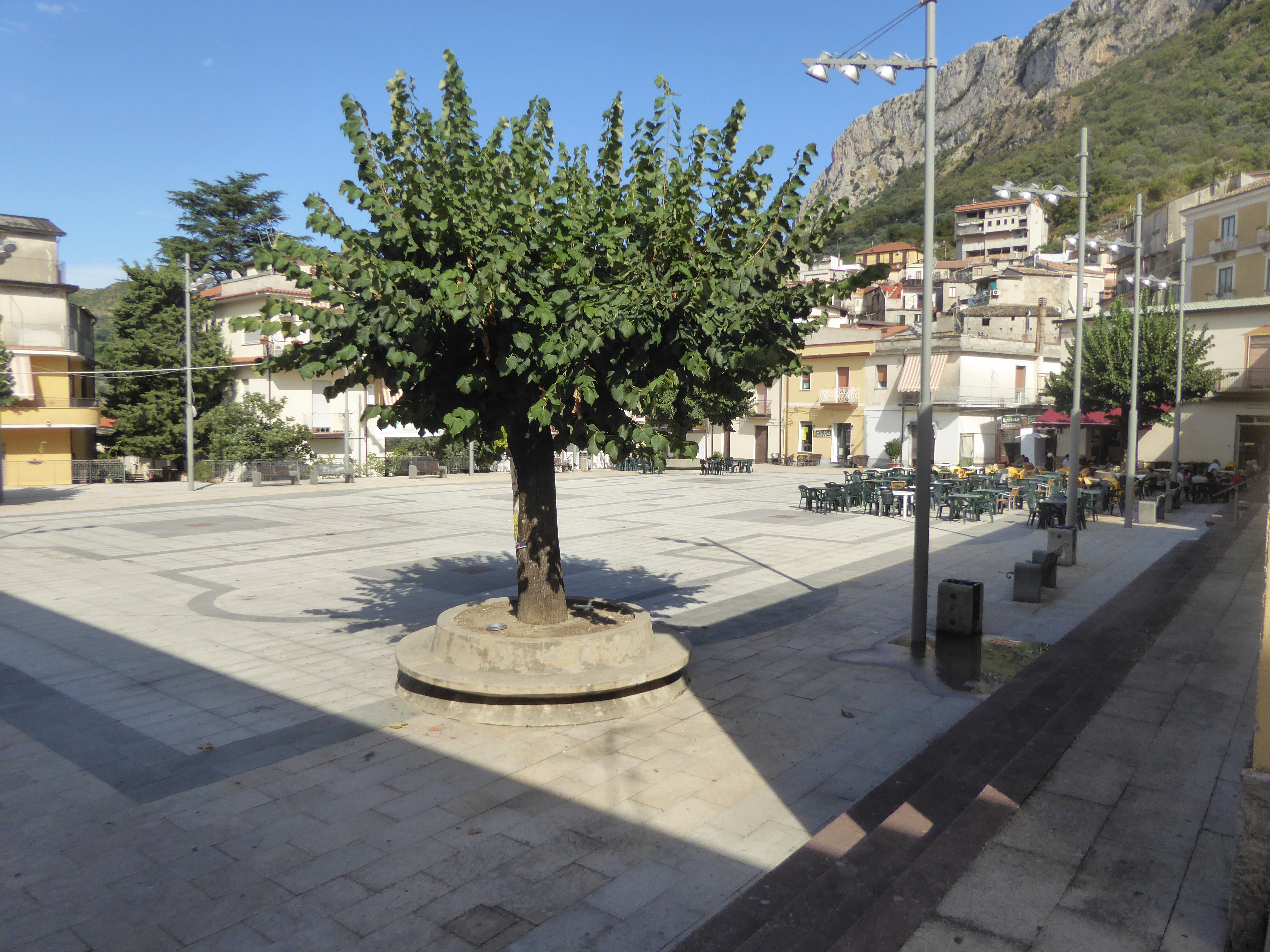 Piazza del Popolo a Bivongi 2018